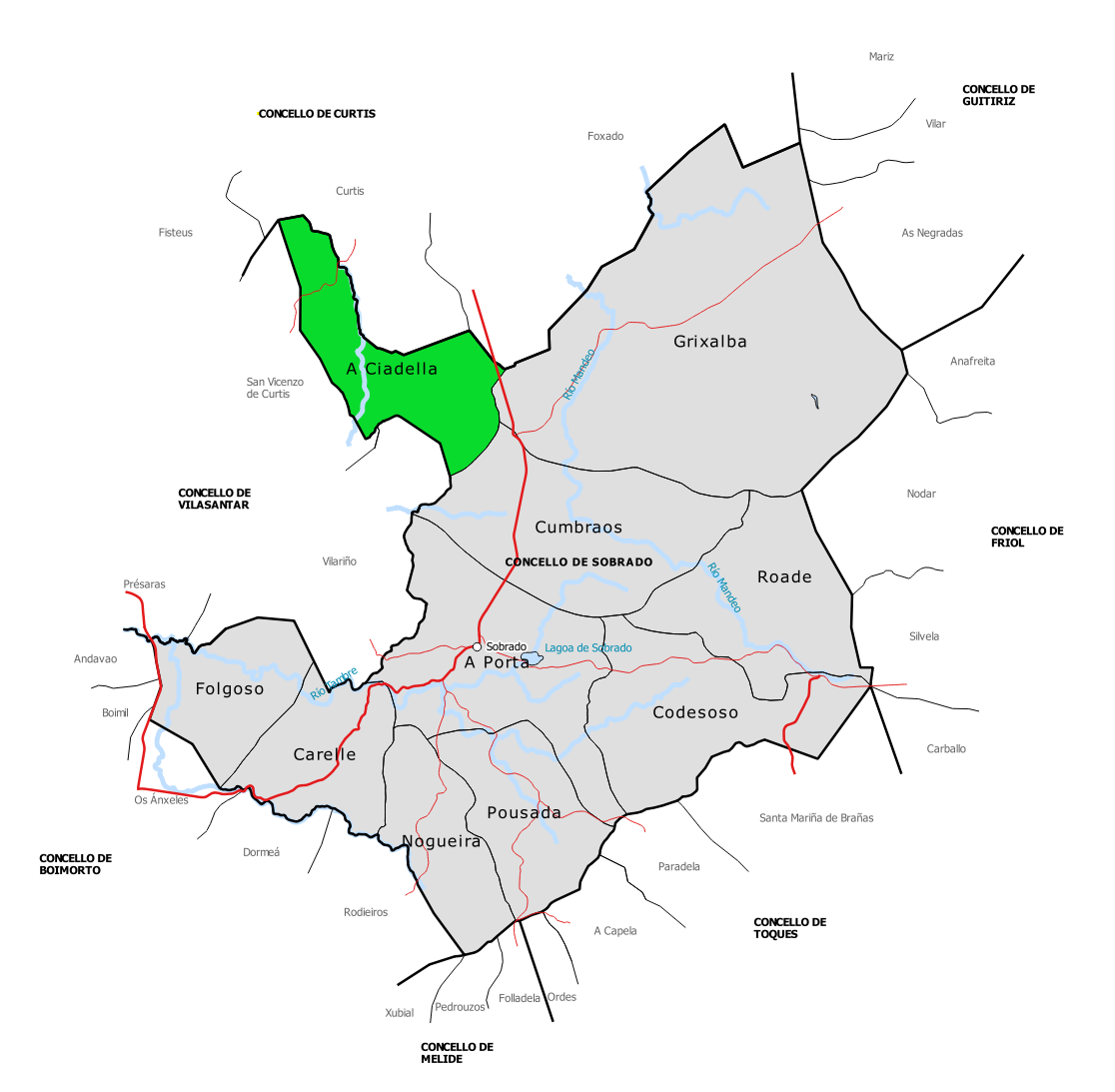 Mapa da parroquia da Ciadella no concello de Sobrado.